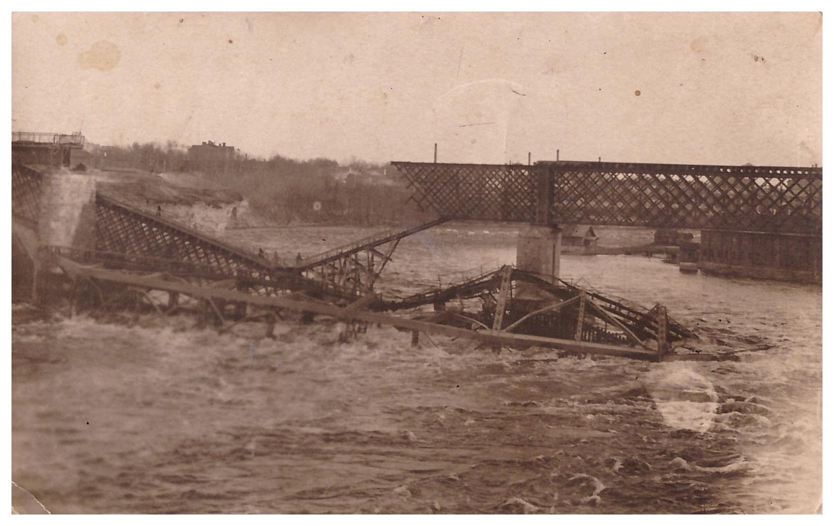 Narva raudteesild, mis oli purustatud 1918.-19. aastal